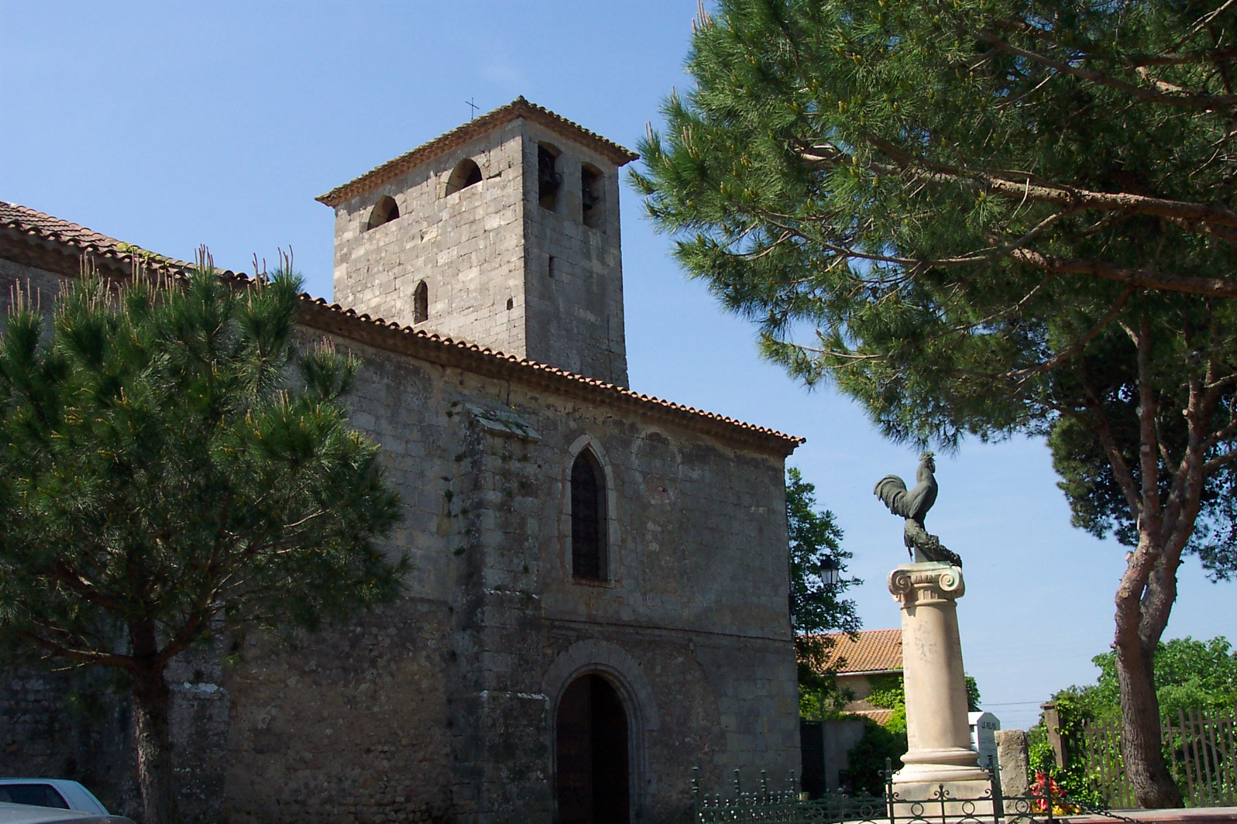 Le clocher